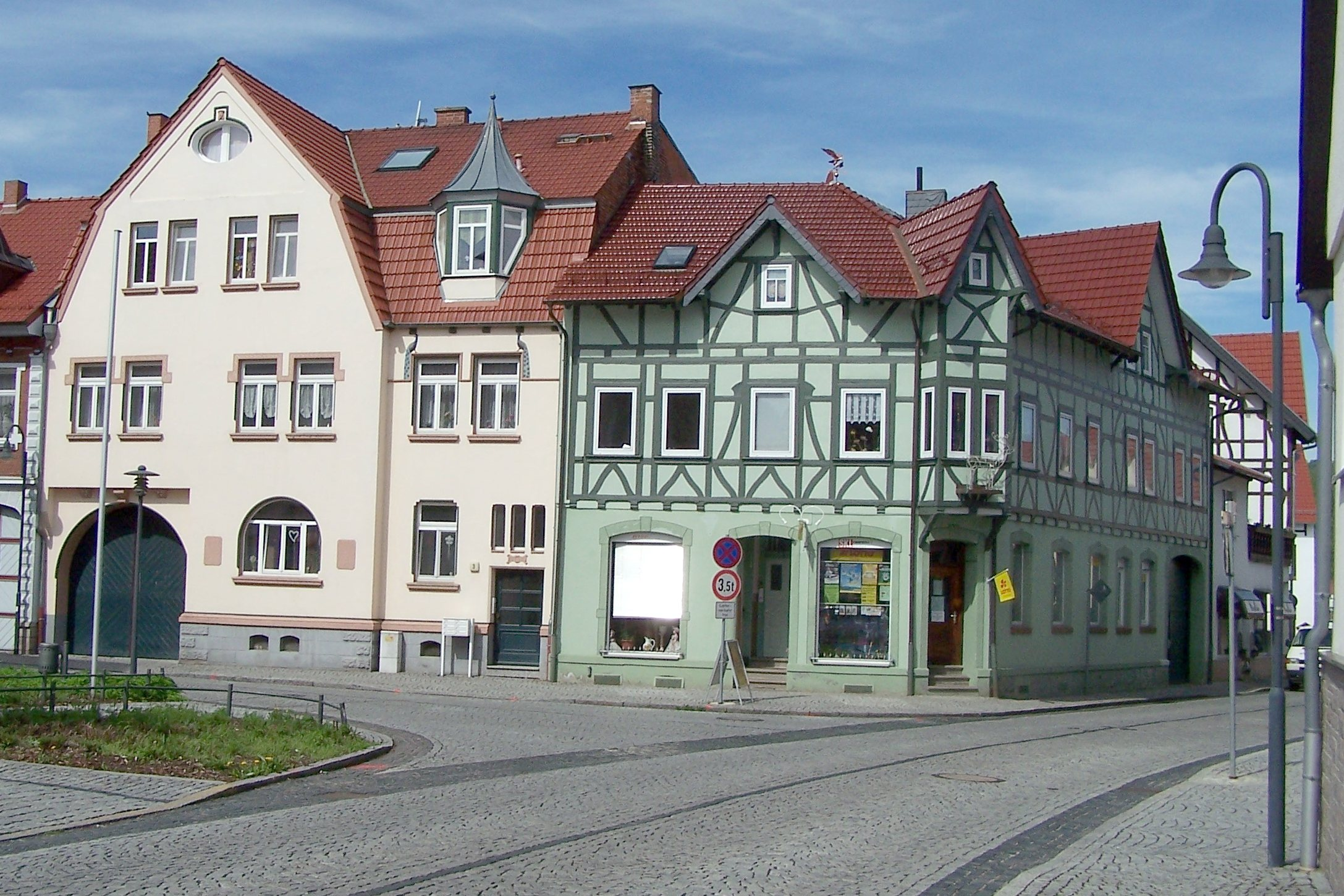 Gebäudeensemble in der Altstadt - gegenüber dem Rathaus.